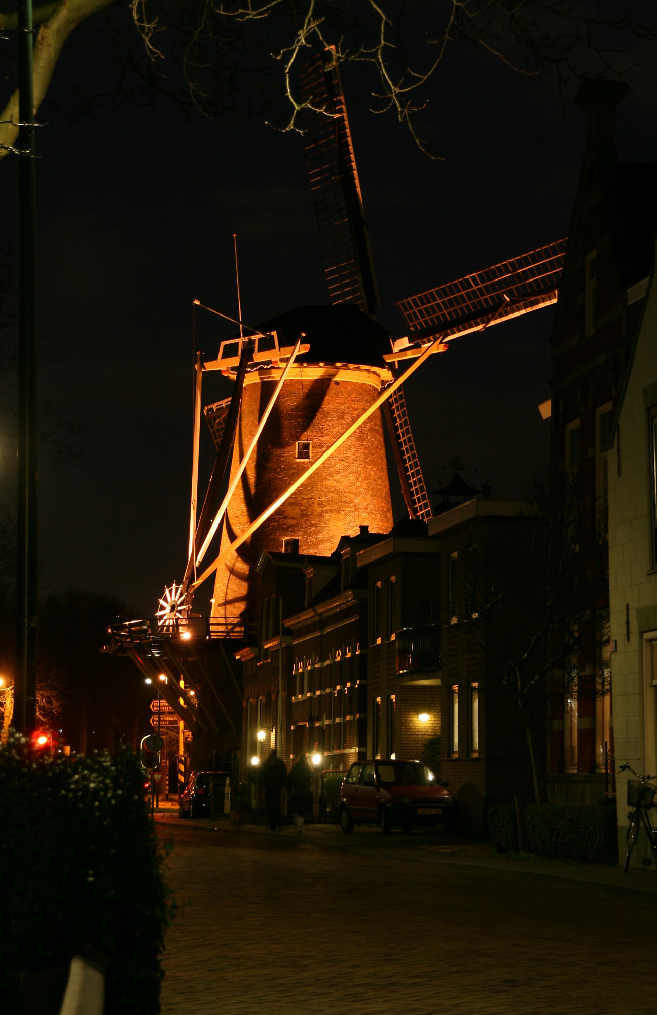 Maassluis, windmolen De Hoop bij avond, gezien vanaf de Zuiddijk